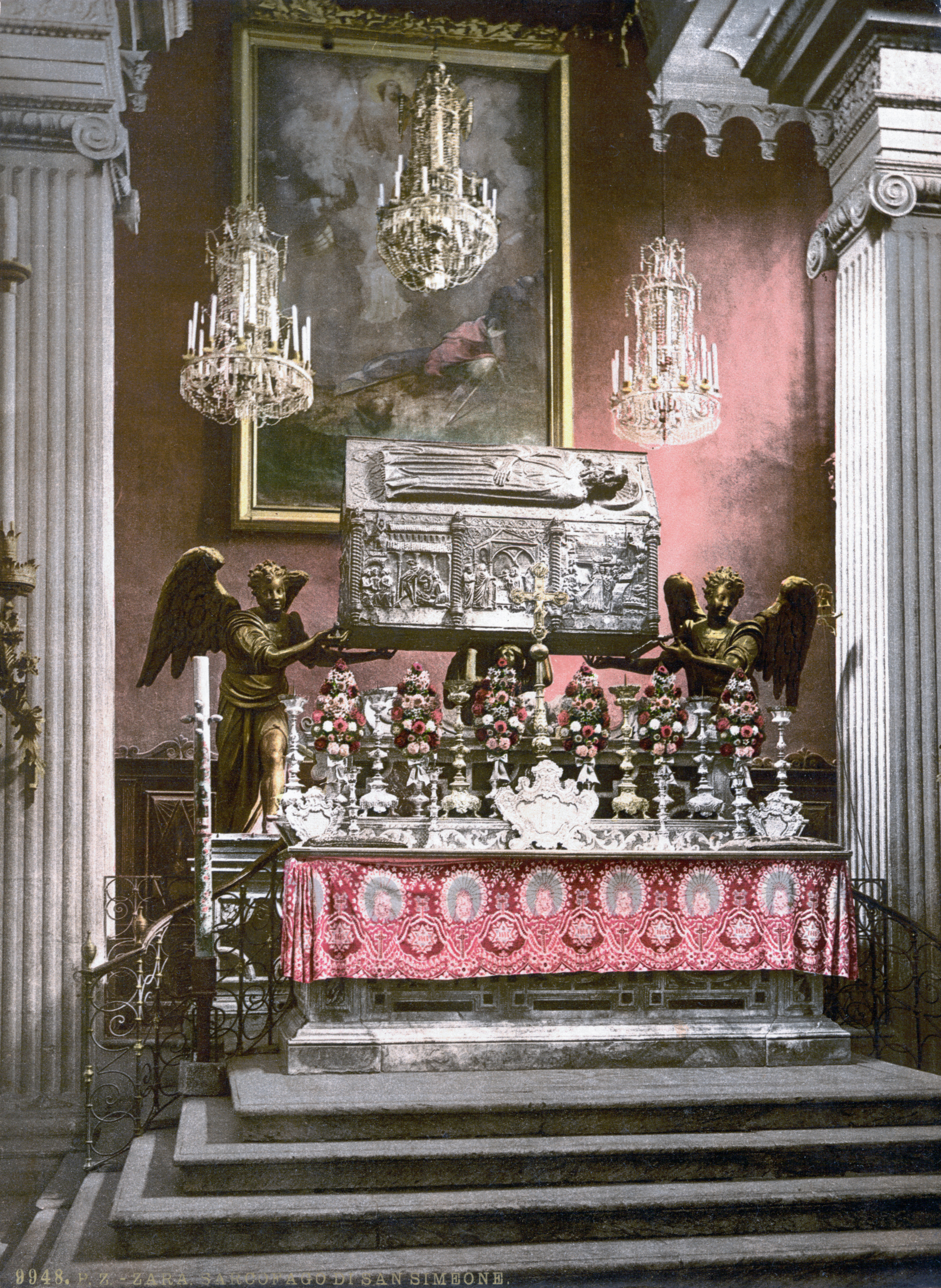 Reliquienschrein des hl. Simeon in der ihm geweihten Kirche zu Zadar (um 1900)